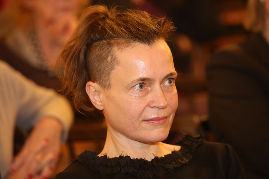 Susanna Kirchmayr-3871